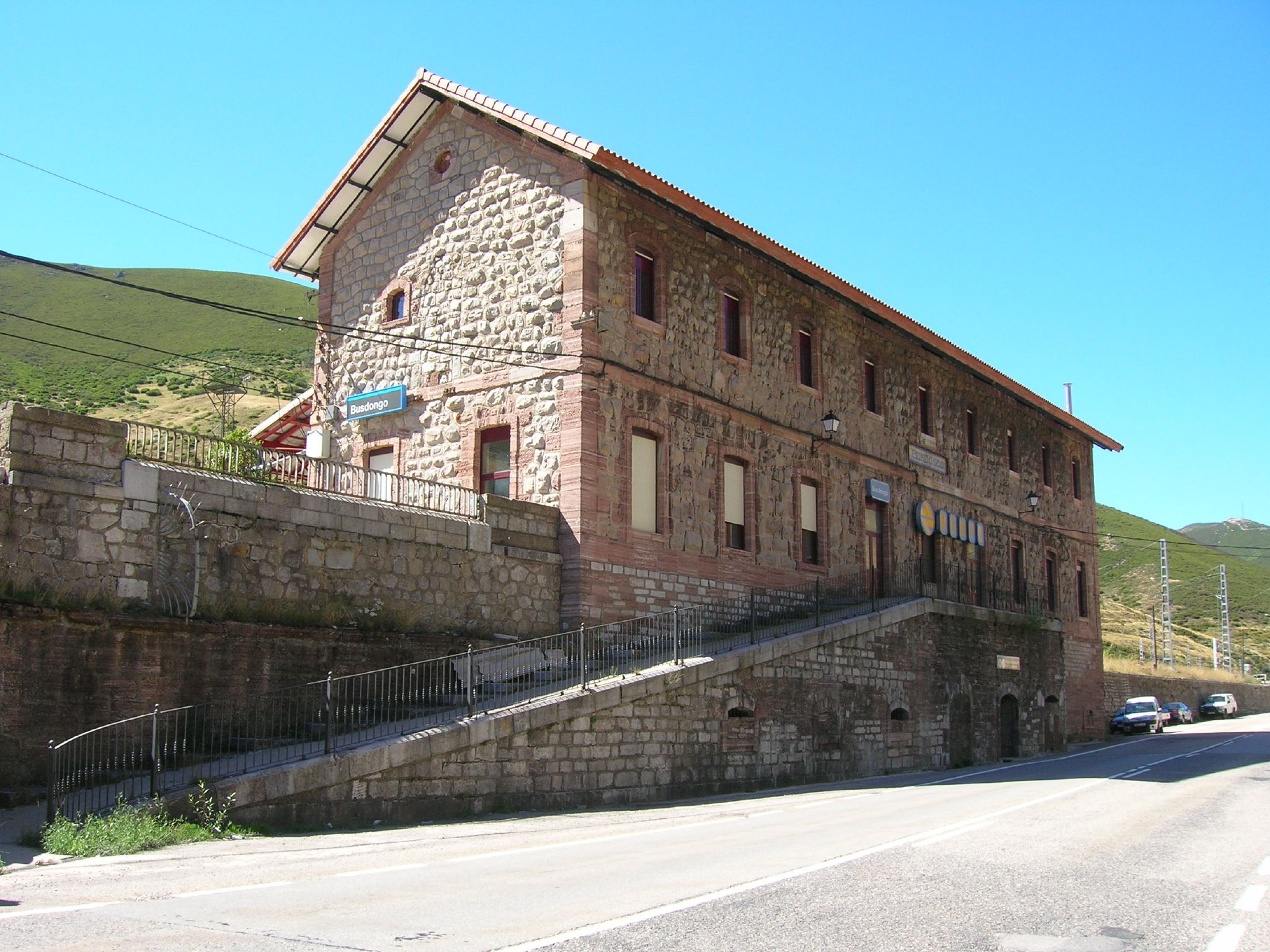 Edificio de la estación de Busdongo (Villamanín, provincia de León, Castilla y León).